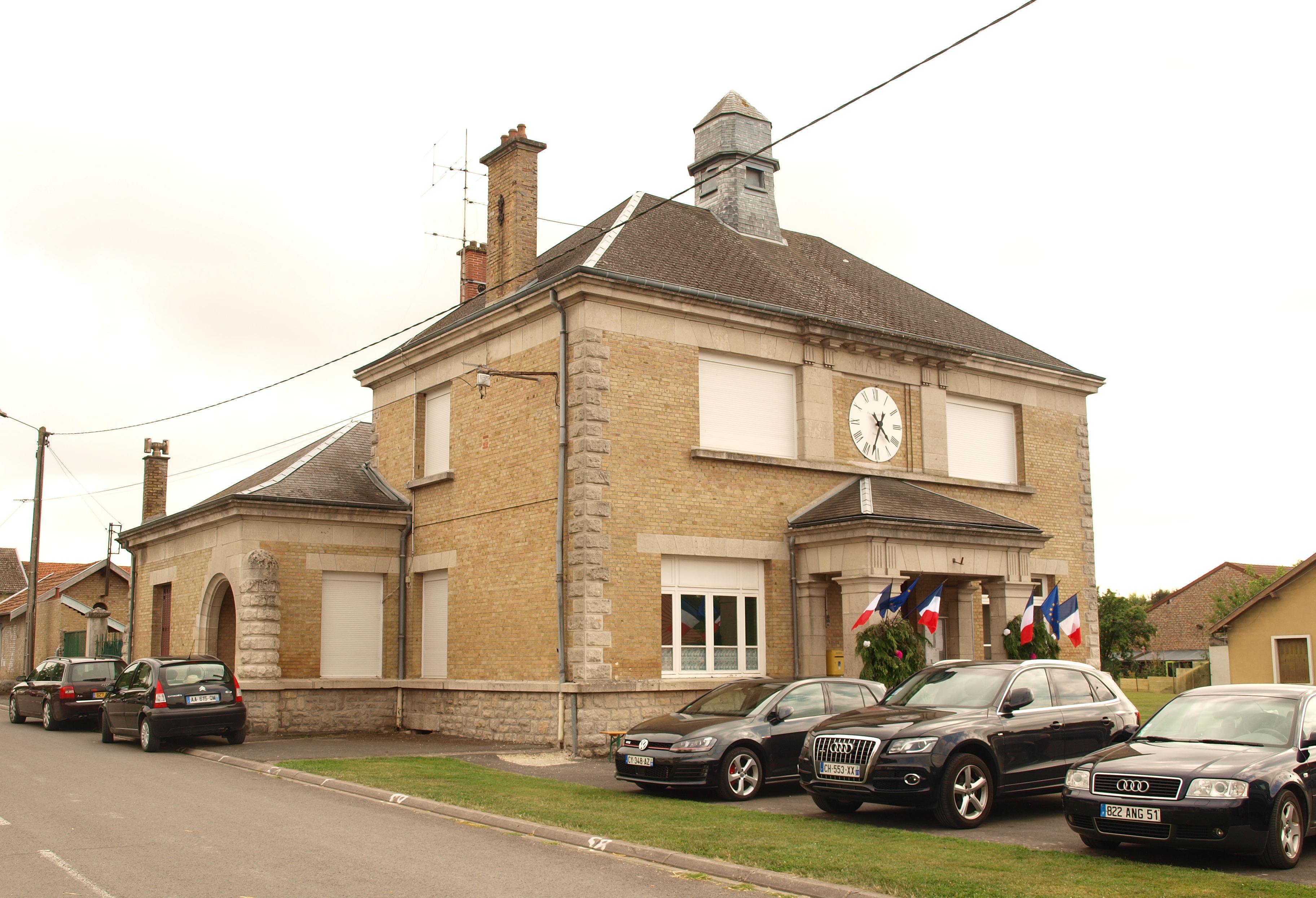 Saint-Étienne-à-Arnes (Ardennes, France) ; mairie